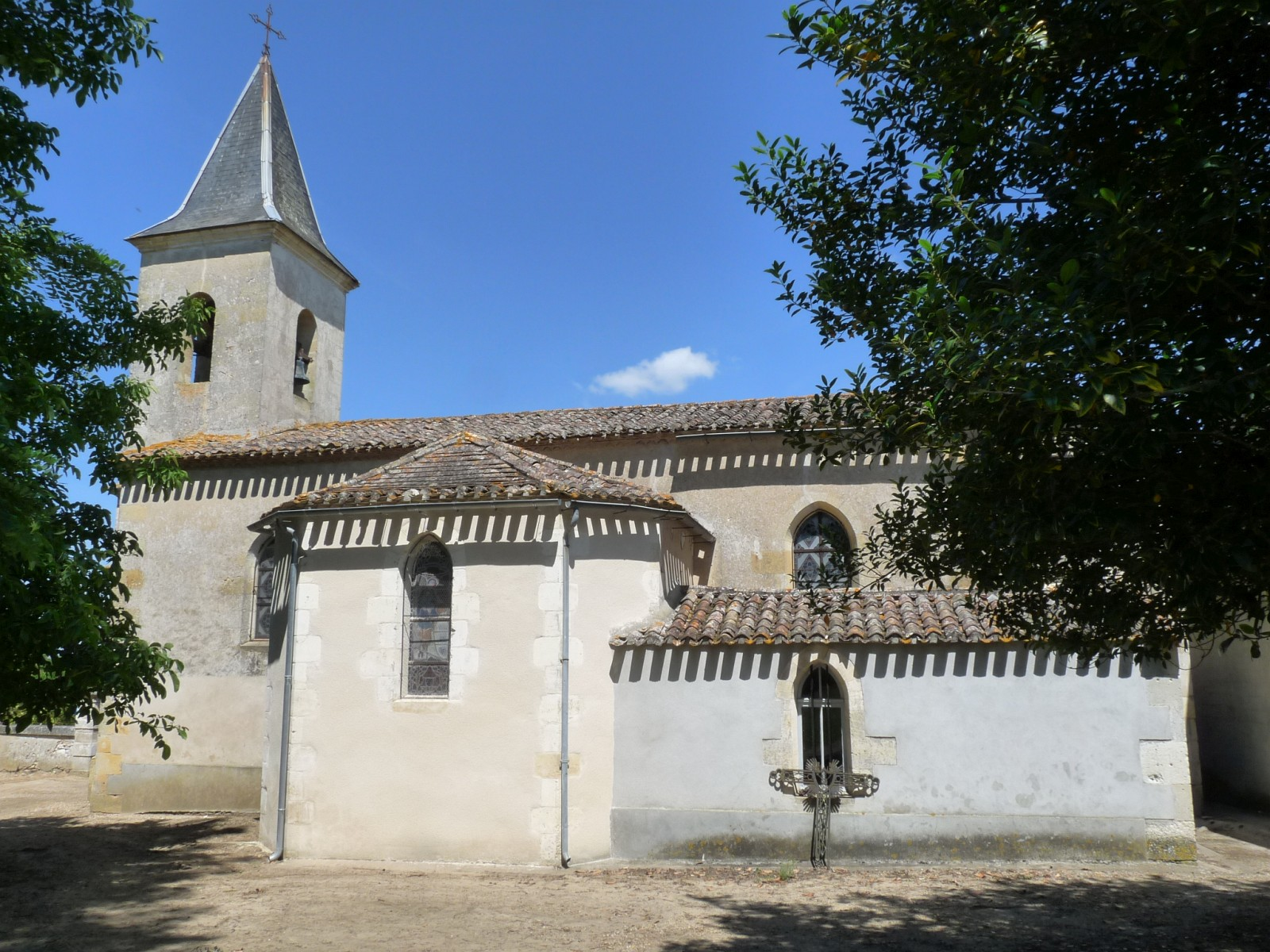 Eglise d'Eynesse, Gironde, France